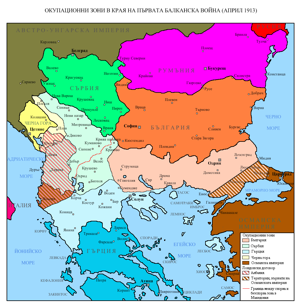 Положението на Балканския полуостров в края на Балканската война